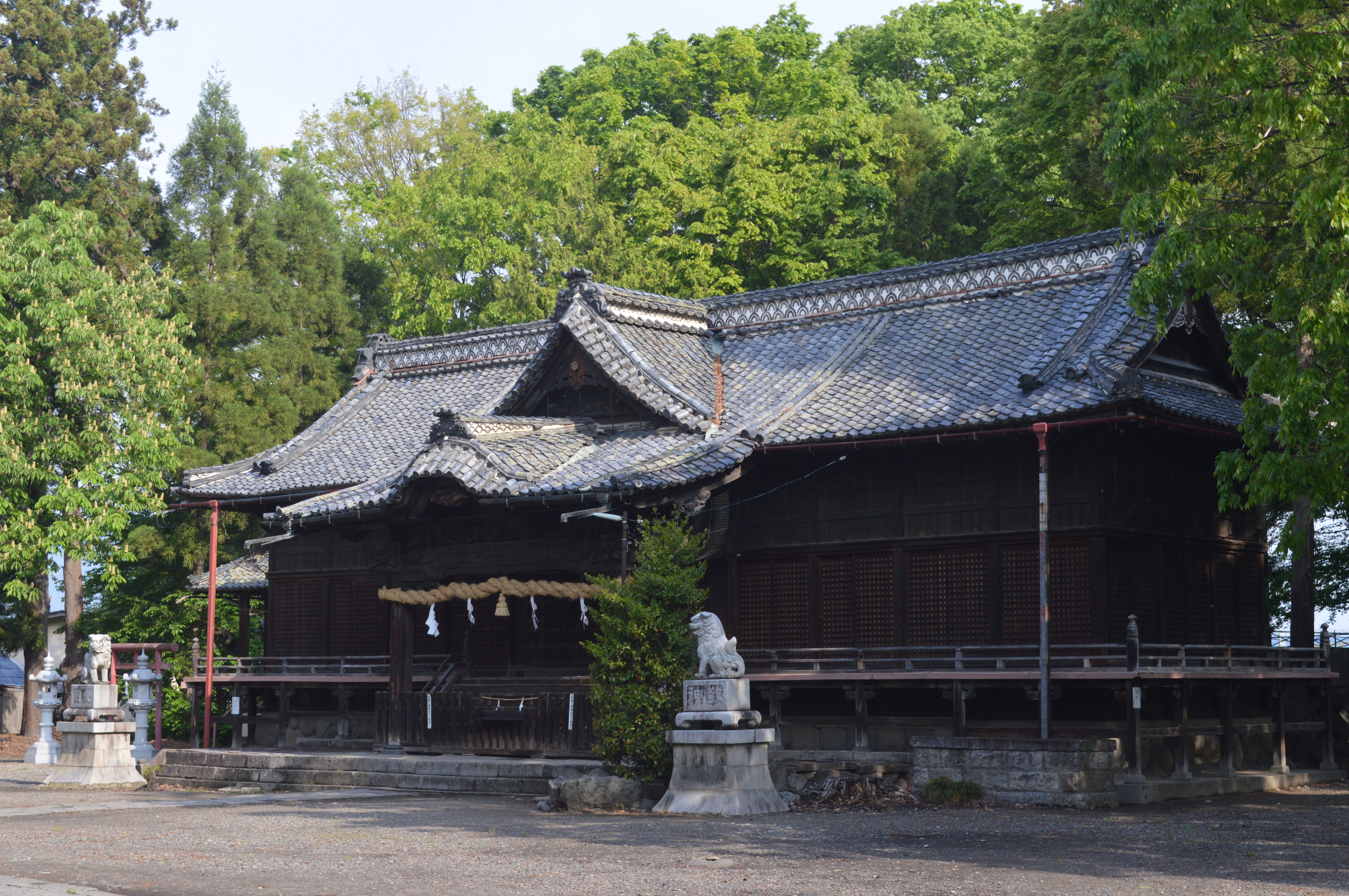 長野県須坂市の墨坂神社（芝宮）。